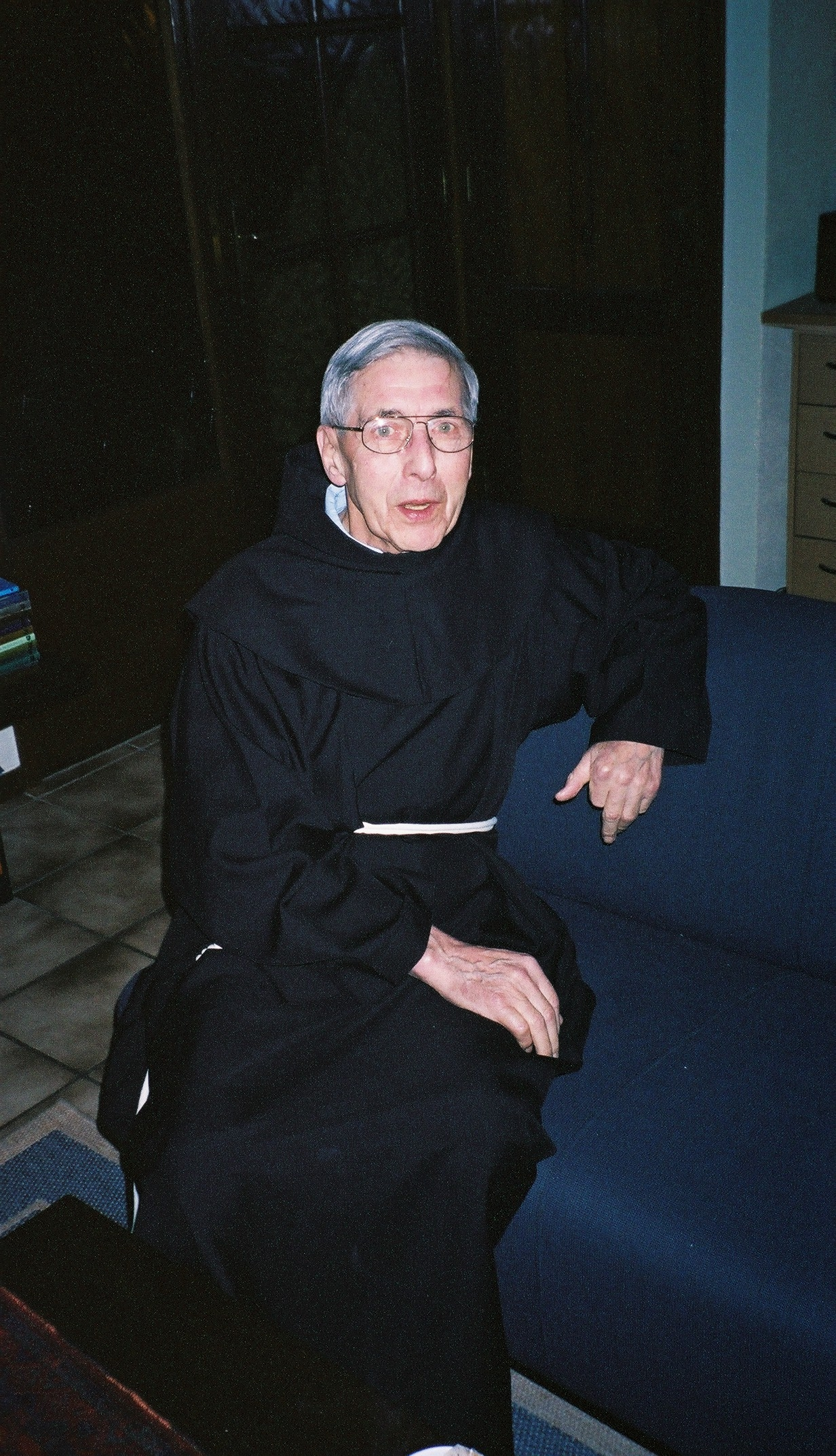 Otho Peters, minderbroeder franciscaan.